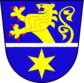 Znak obce Hvězdonice